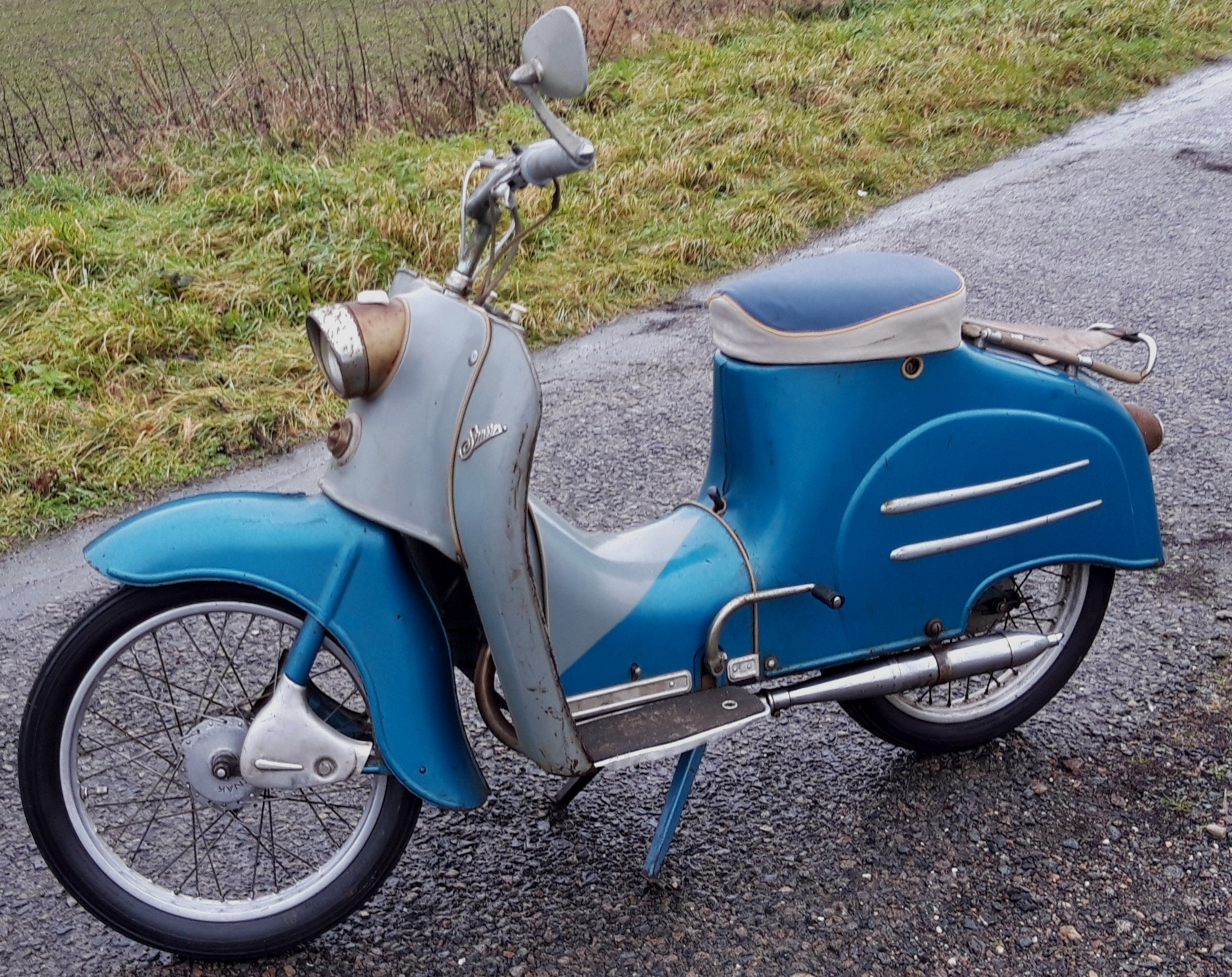 Unrestaurierter Originalzustand